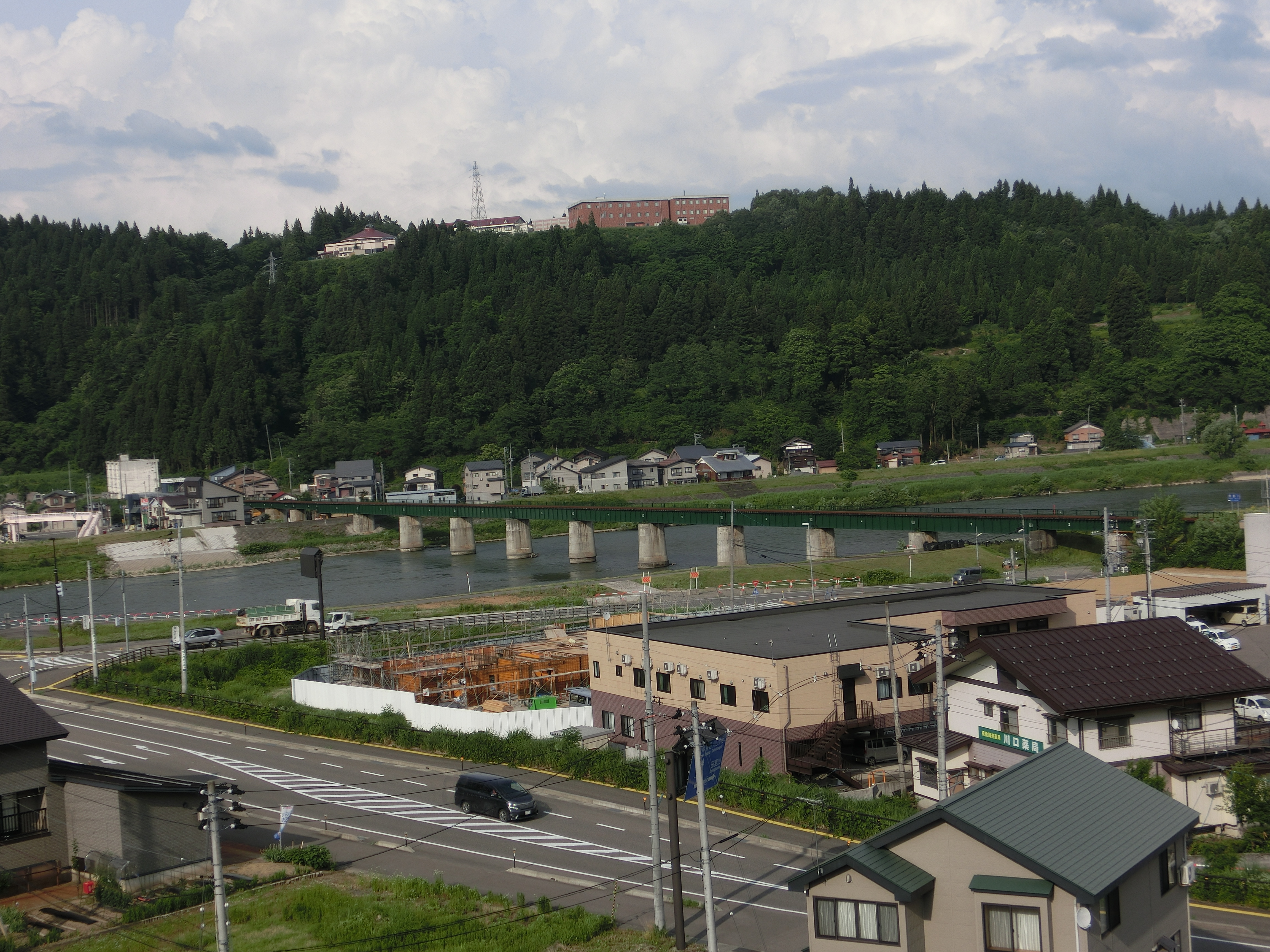 投稿者によって新潟県長岡市西川口（魚野川左岸）より魚野川橋梁 (飯山線)を撮影。 対岸の山の上に見える建築物は、"えちご川口温泉"及び"えちご川口ホテルサンローラ"。